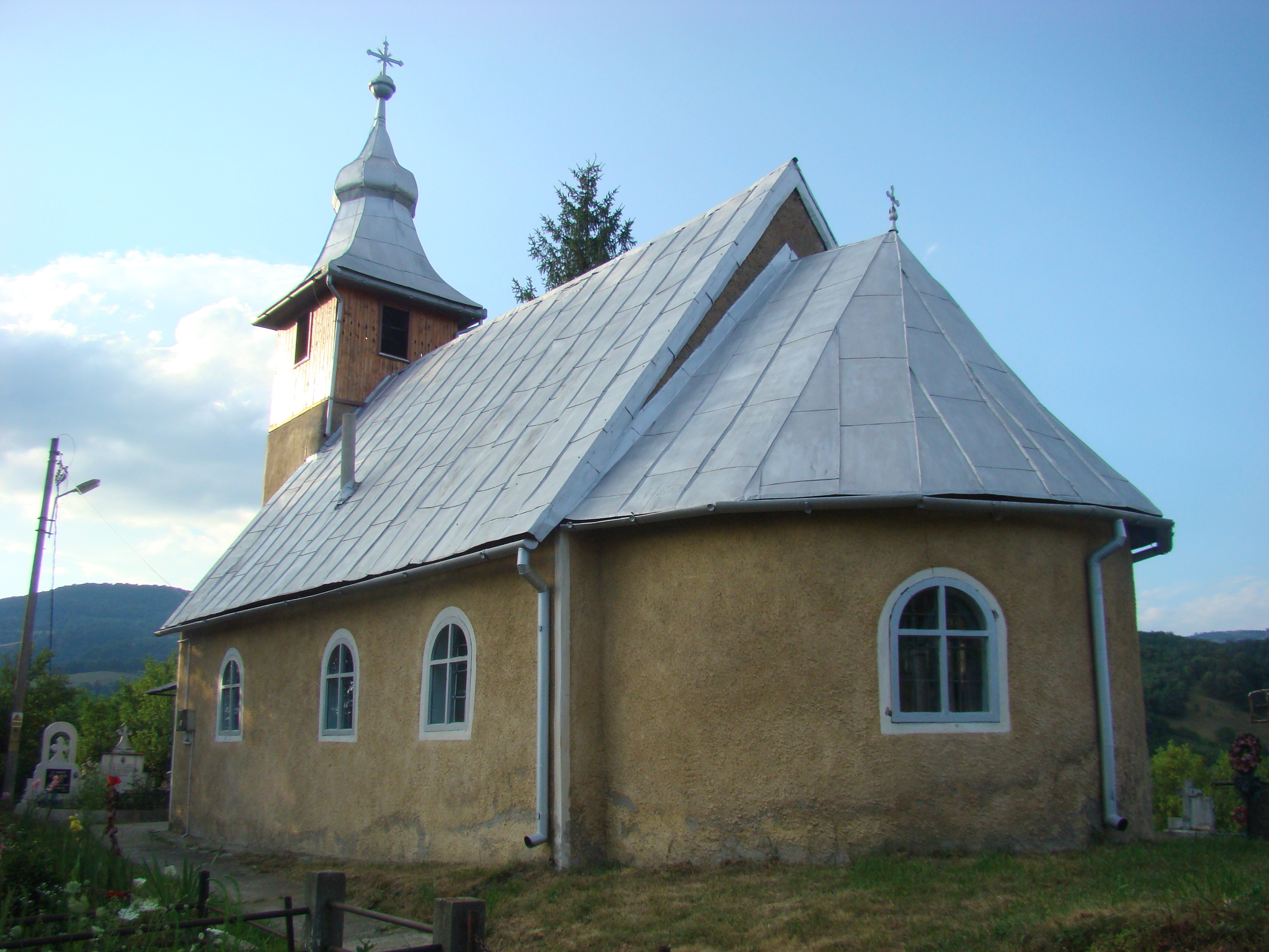 Biserica „Pogorârea Sf. Duh”, sat Ponor; comuna Pui